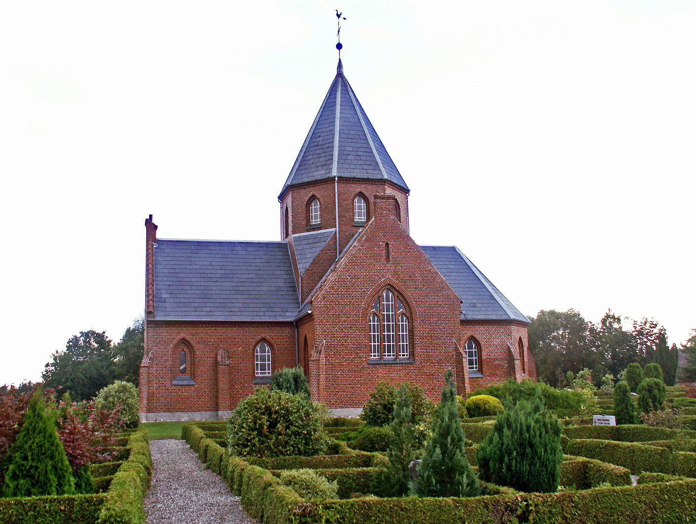 fra syd